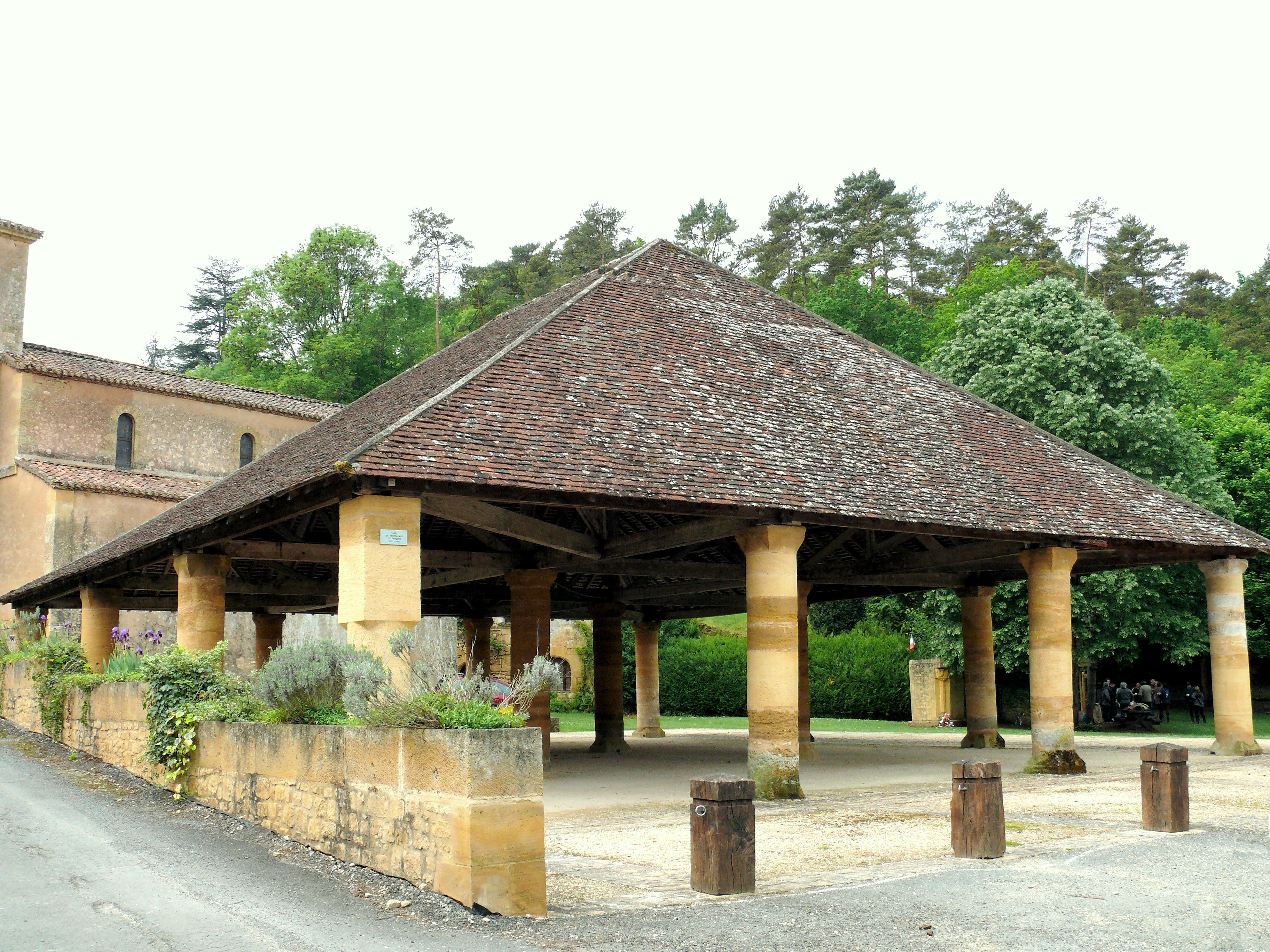 Montferrand-du-Périgord - Halles